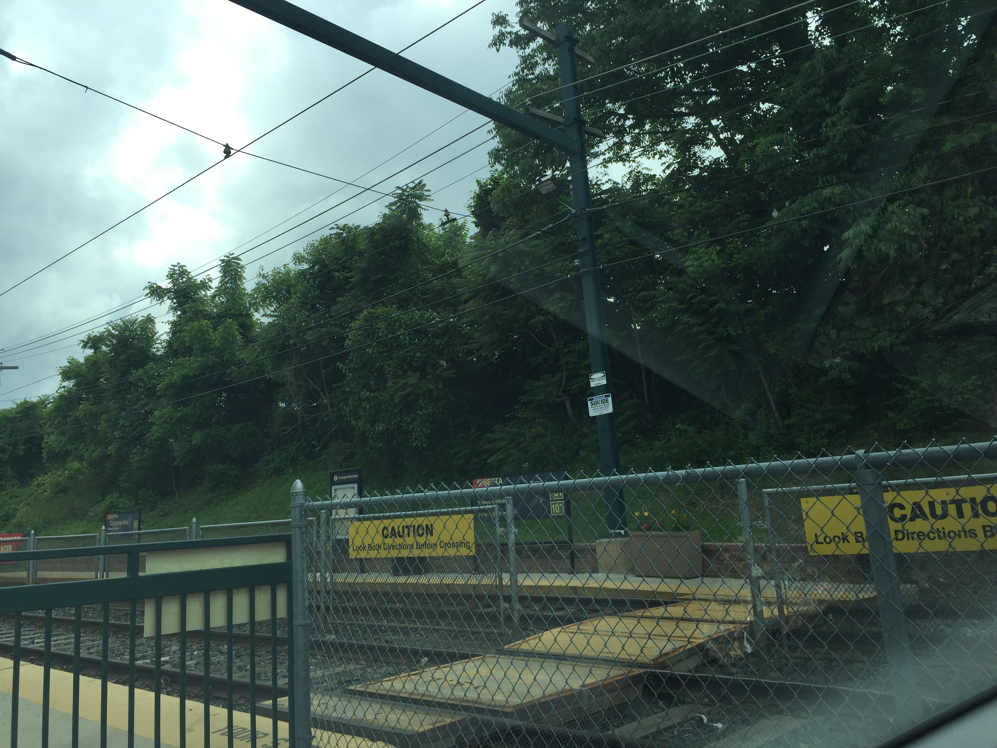 Congress avenue